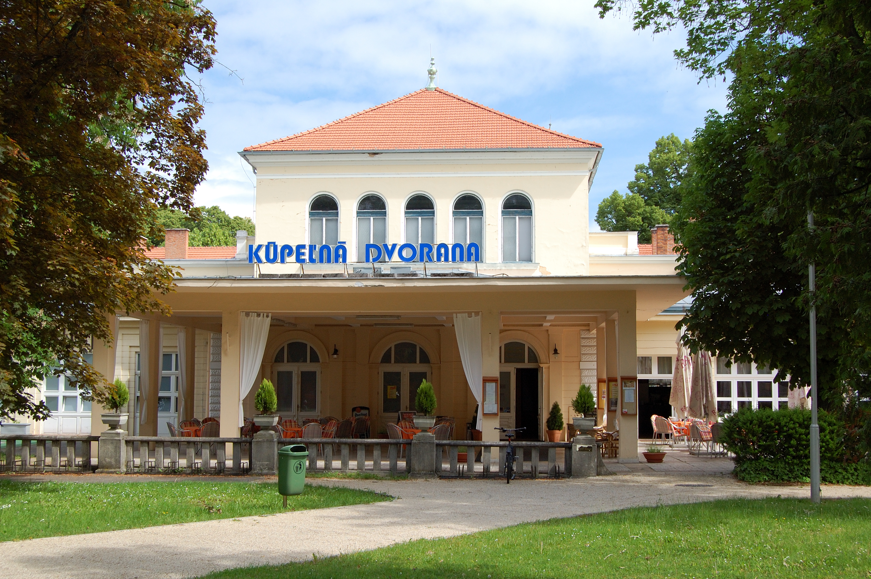 Budova kúpeľnej dvorany (Kursalónu) v Piešťanoch. V roku 1894 ju postavili podľa projektu Ignáca Alpára (1855 - 1928)